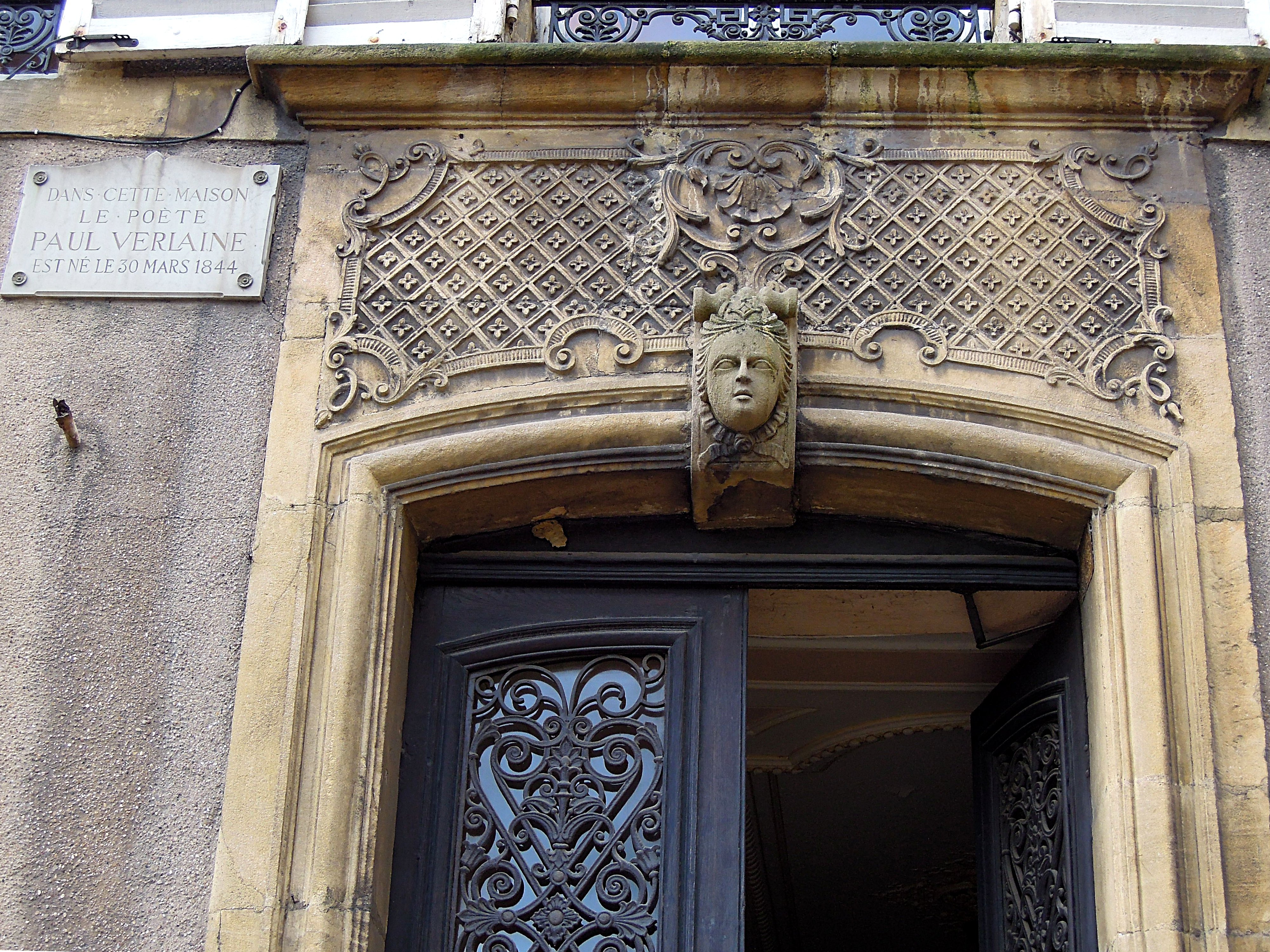 Détail. 2, rue de Haute Pierre. Metz. Inscrite PH 1978. .